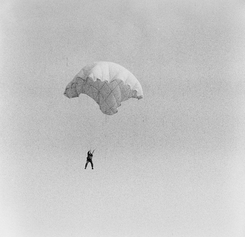 Original image description from the Deutsche Fotothek Fallschirmspringer Riesa